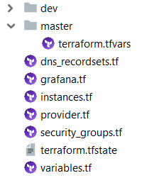 Exemple d'un projet Terraform (Infrastructure as Code).